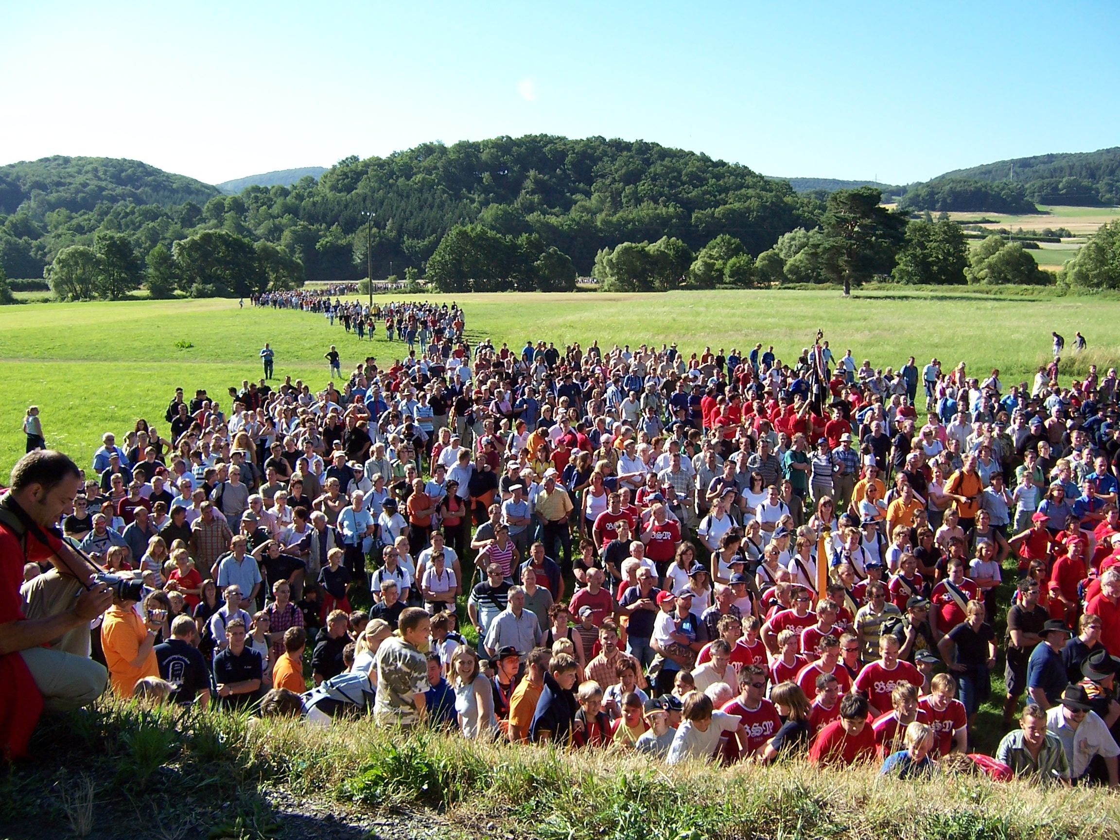 Buchenau - Grenzgang 2006: Teilstrecke rechts der Lahn, Bild 1